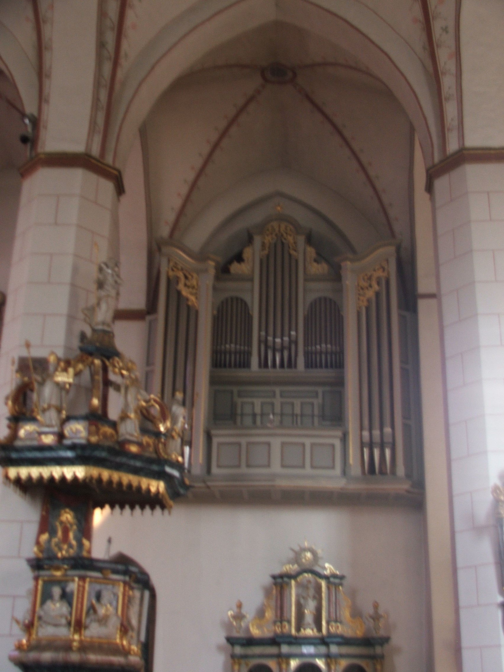 Orgel Propsteikirche St. Laurentius, Arnsberg